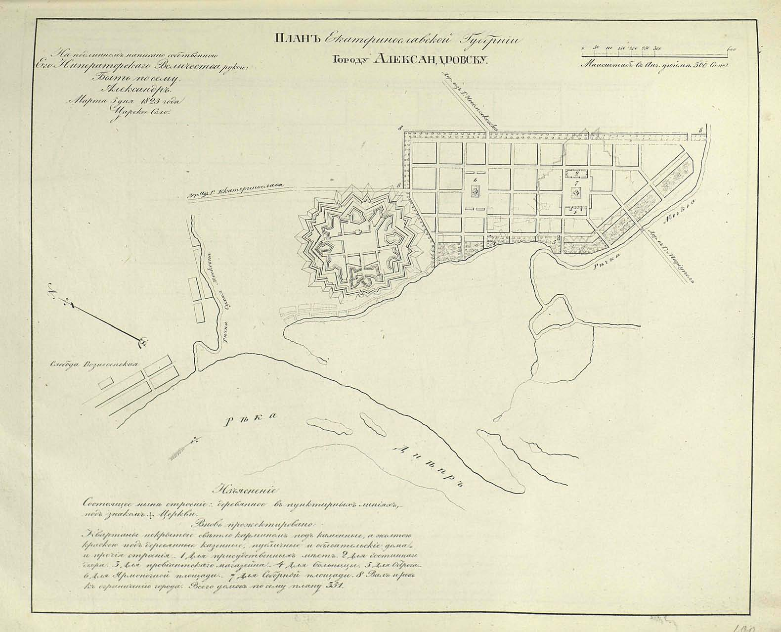 Планъ Екатеринославской Губерніи городу Александровску. Марта 5 дня 1823 года